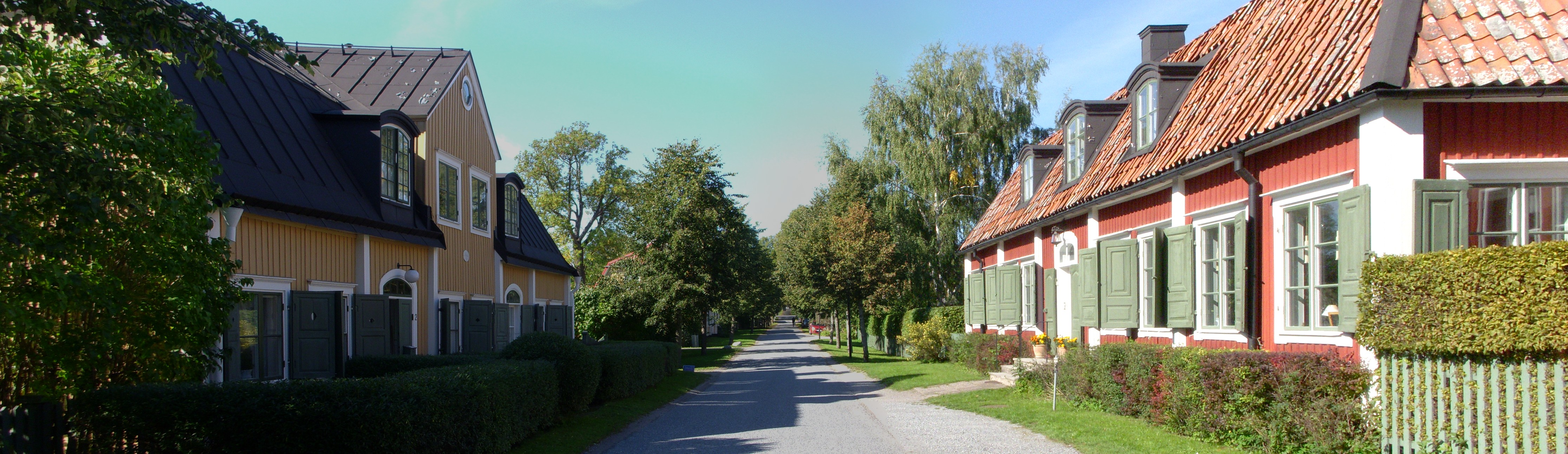 Cantongatan vy mot norr, Drottningholm